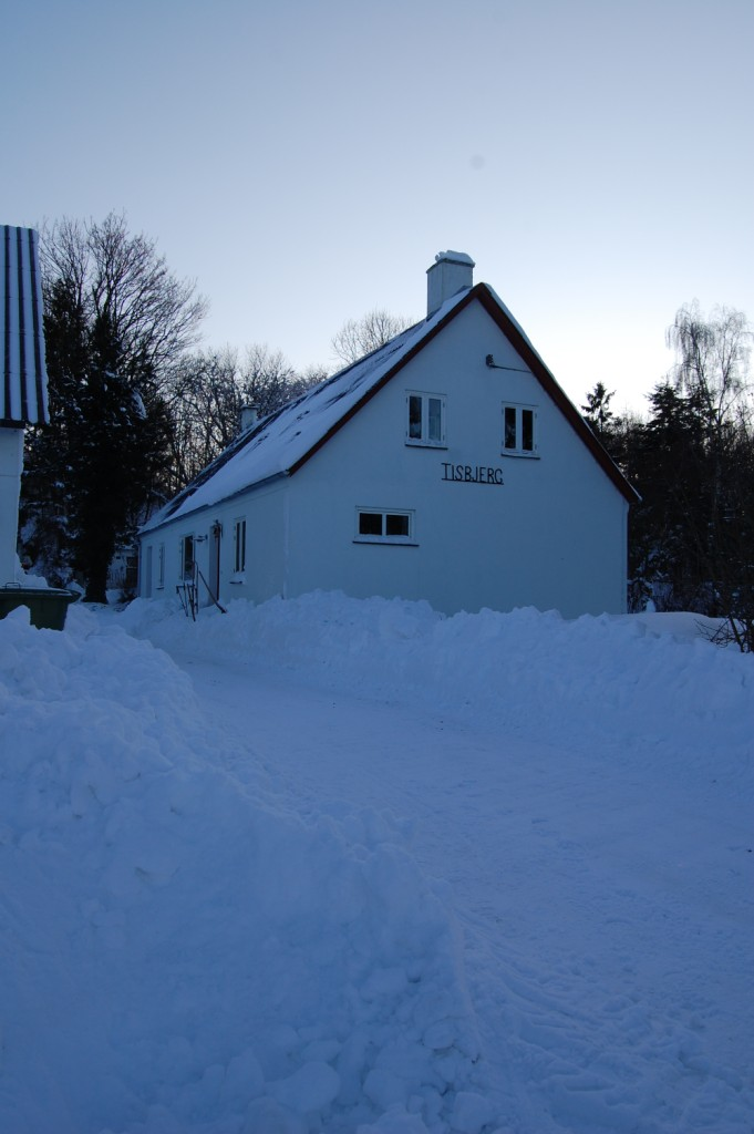 Tisbjerg (foto1)